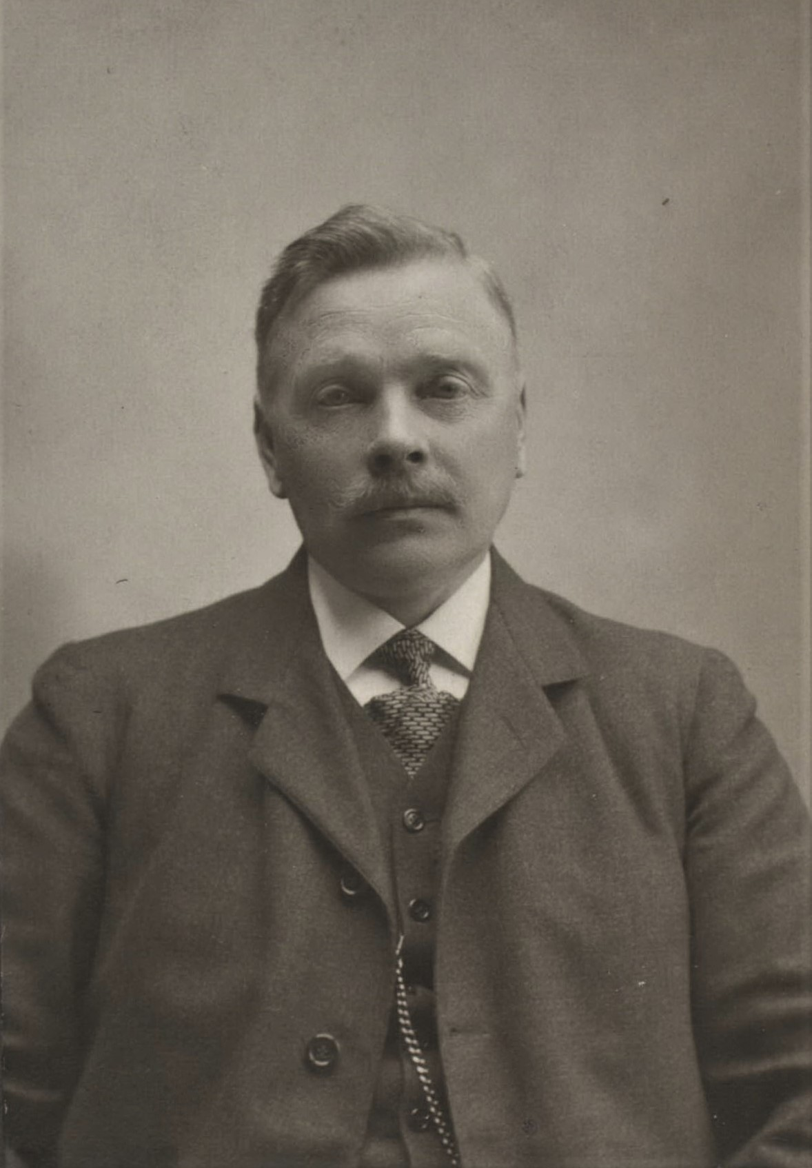 Peter Mortensen (1852–1924), købmand og skibsreder i Tvøroyri på Færøerne.Føroyskt: Peter Mortensen (1852–1924), keypmaður og reiðari á Tvøroyri.